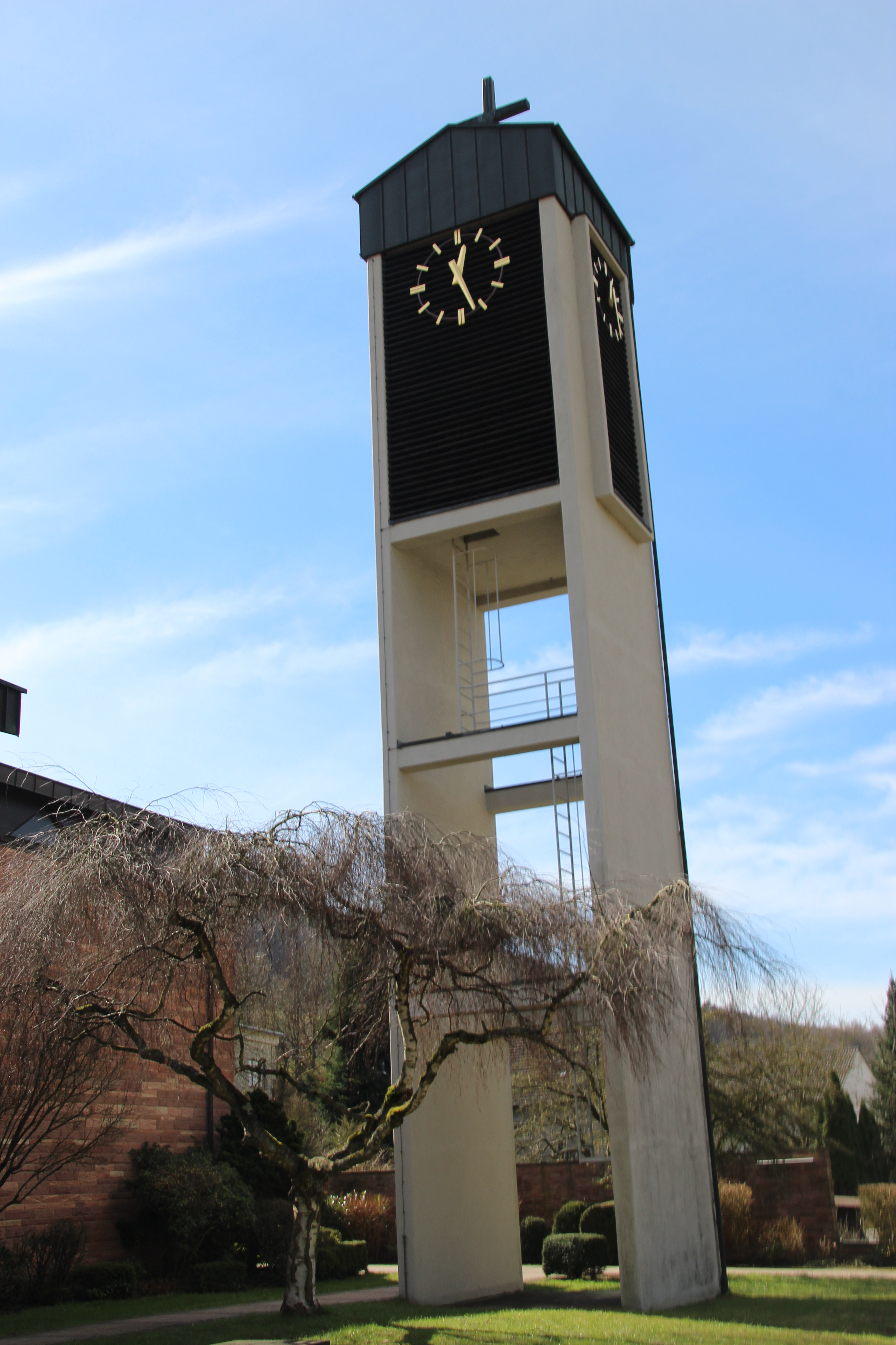 Der freistehende Kirchturm der Kuratiekirche St. Maria Magdalena in Soden (Markt Sulzbach am Main). Ein Spessart-Campanile